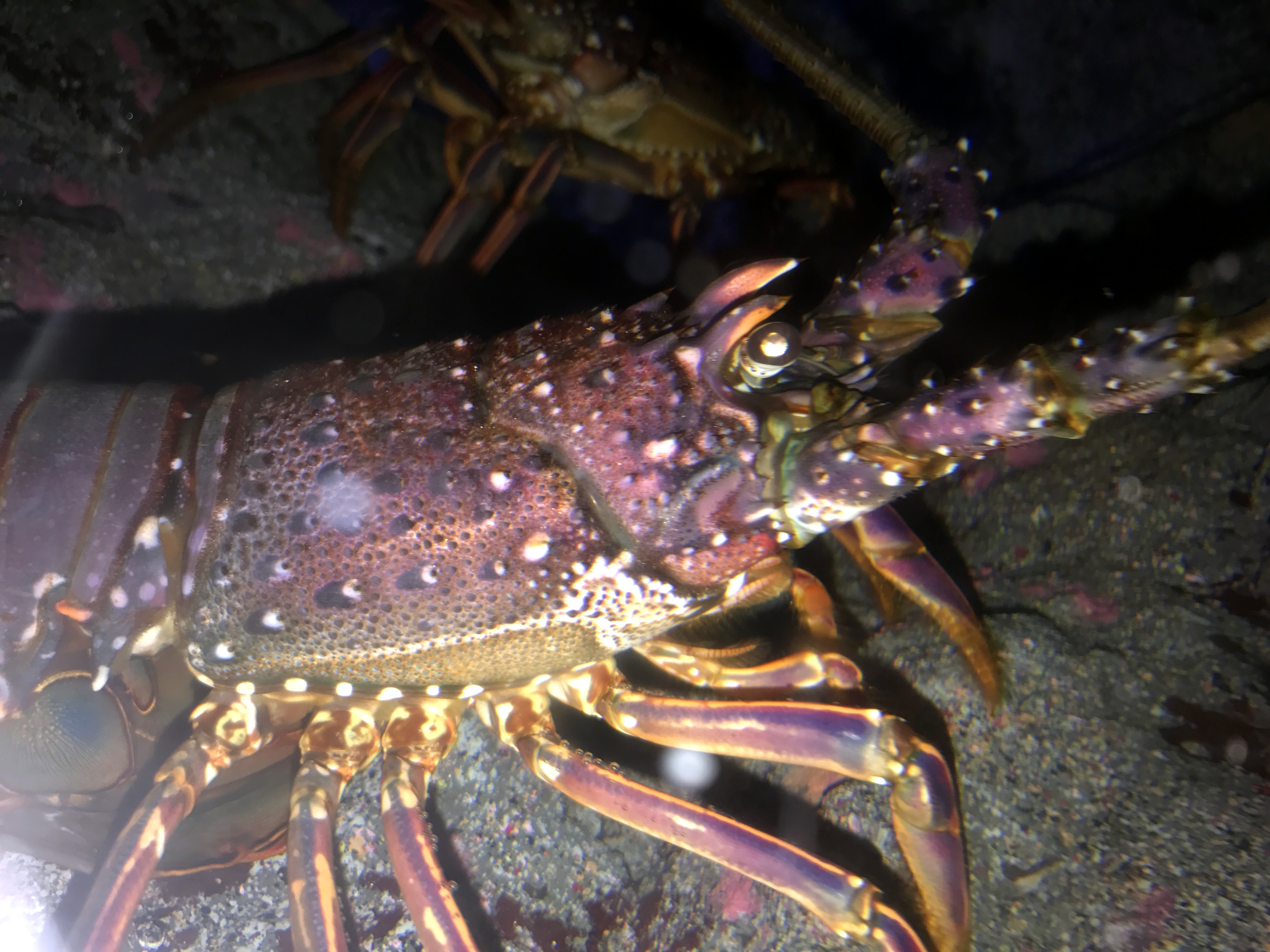 イセエビの頭部拡大